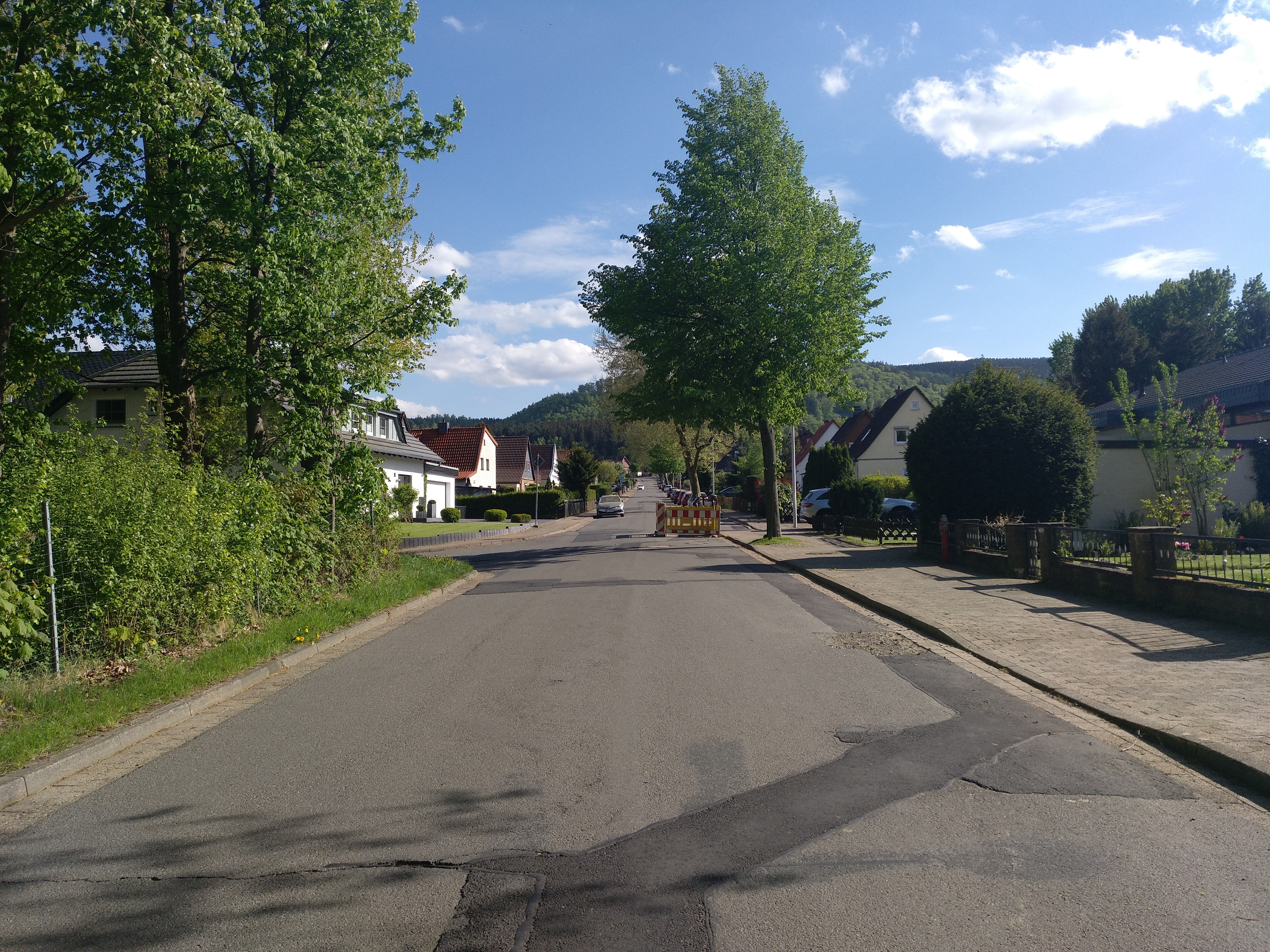 Weichbild von Göttingerode von der Kreisstraße aus, Blickrichtung Süden.